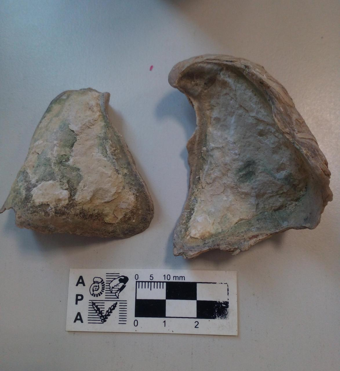 Es una ostra del limite Cretácico-Paleógeno de la Formación Jagüel, Neuquen, Argentina. Vista interior